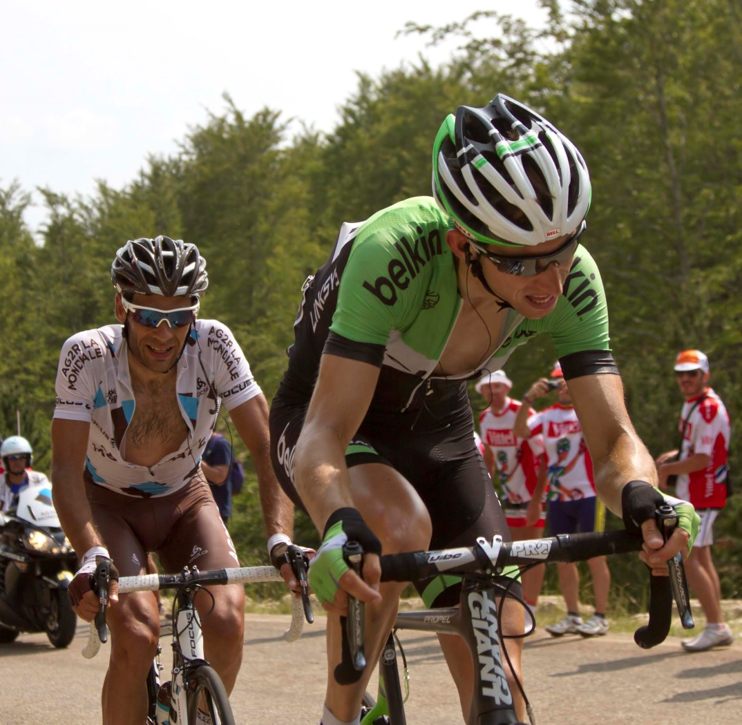 040 mollema en peraud